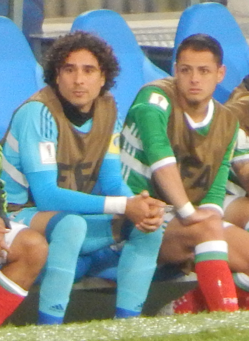 Очоа и Чичарито на скамейке запасных